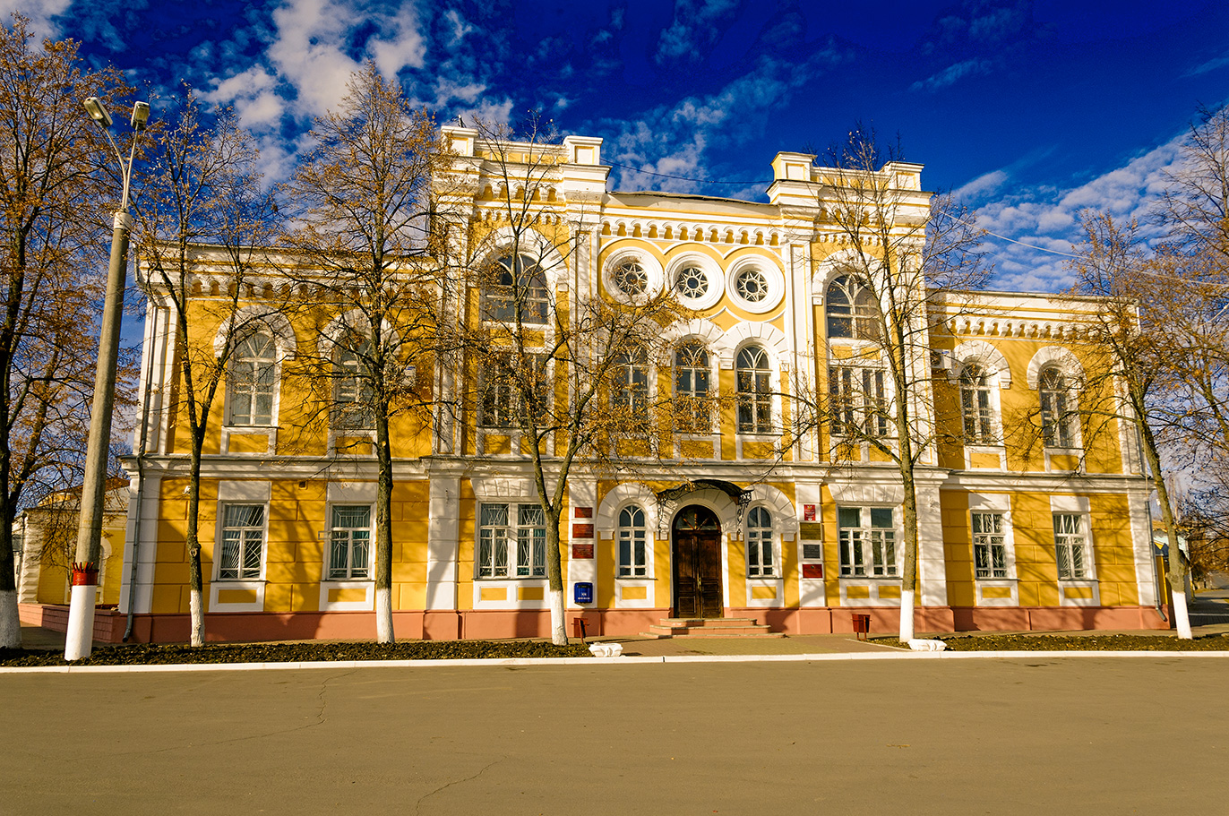 Здание уездного земства (Воронежская область, Богучар, Кирова улица, 1)